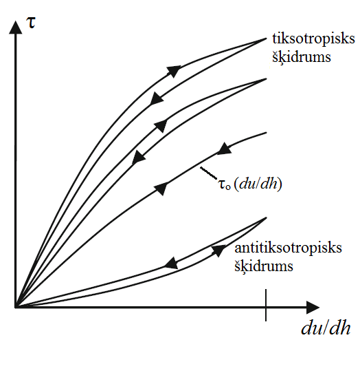 Histerēzes cilpas veidošanās tiksotropiskiem šķidrumiem